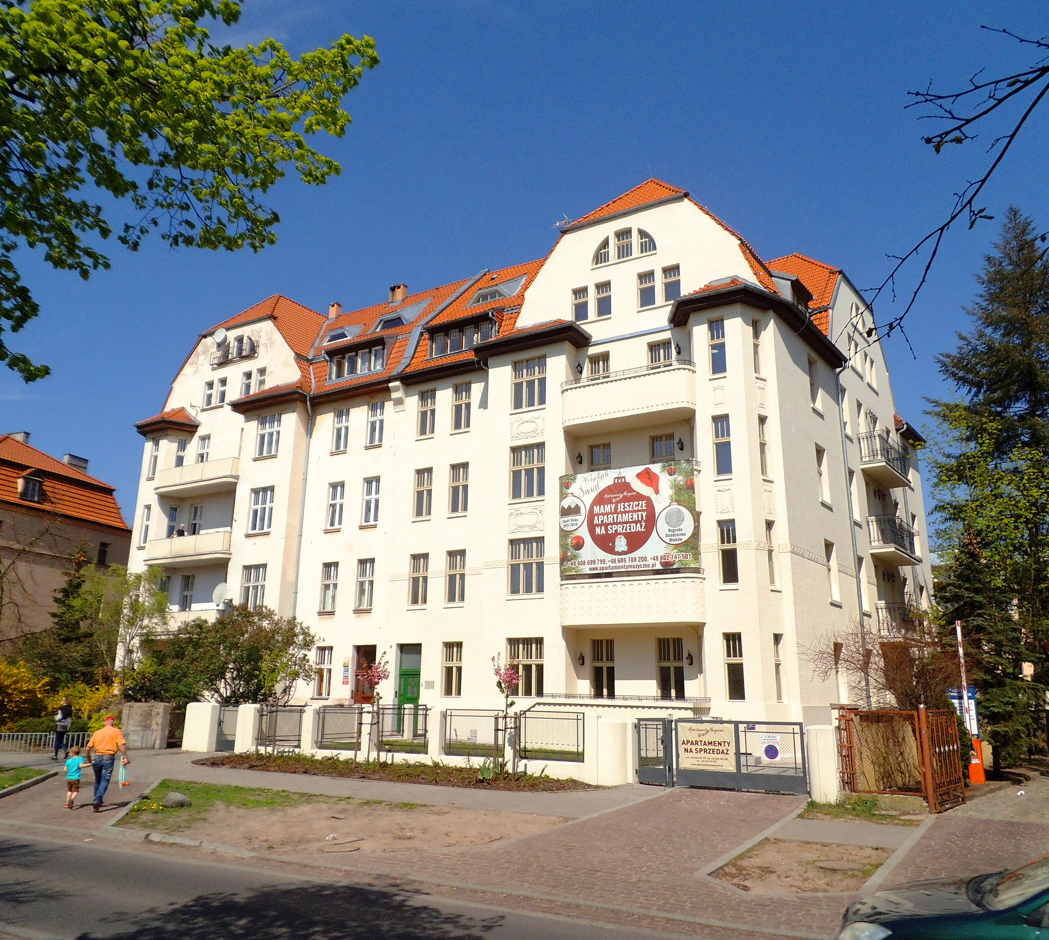 Budynek przy ul. Mickiewicza 28,30 w Toruniu